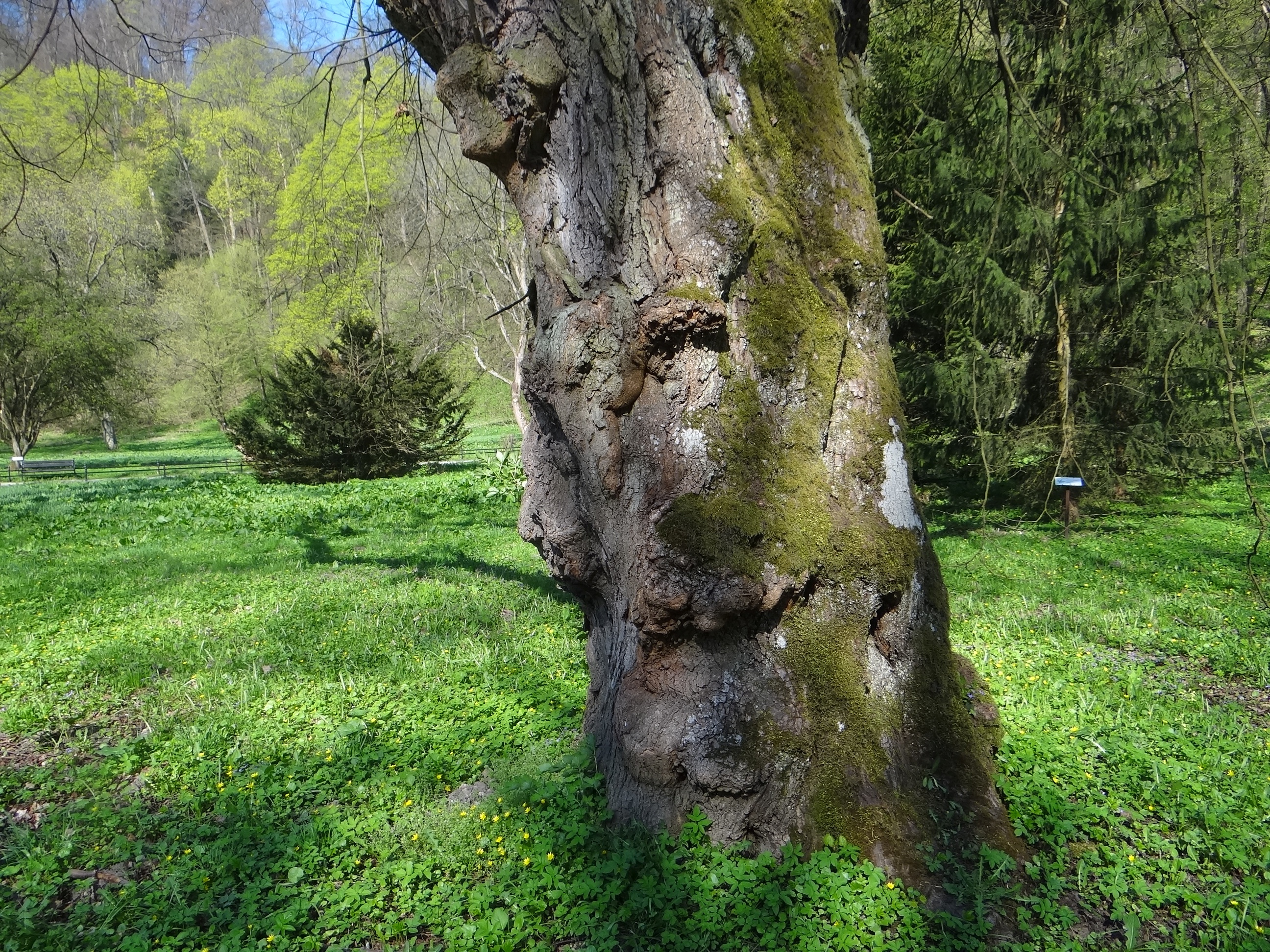 Park Zamkowy w Ojcowie